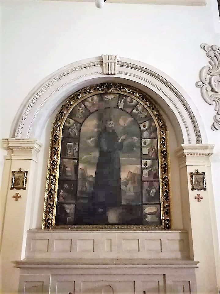 Chiesa di Sant'Antonio di Padova, Barcellona Pozzo di Gotto, primo altare sx, dipinto raffigurante San Diego d'Alcalà ed episodi di vita.